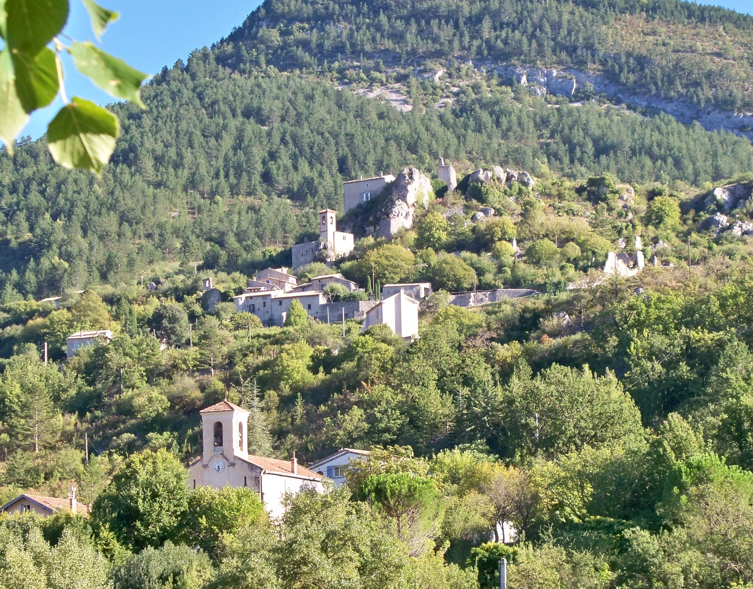 église et chapelle à Sahune (26)